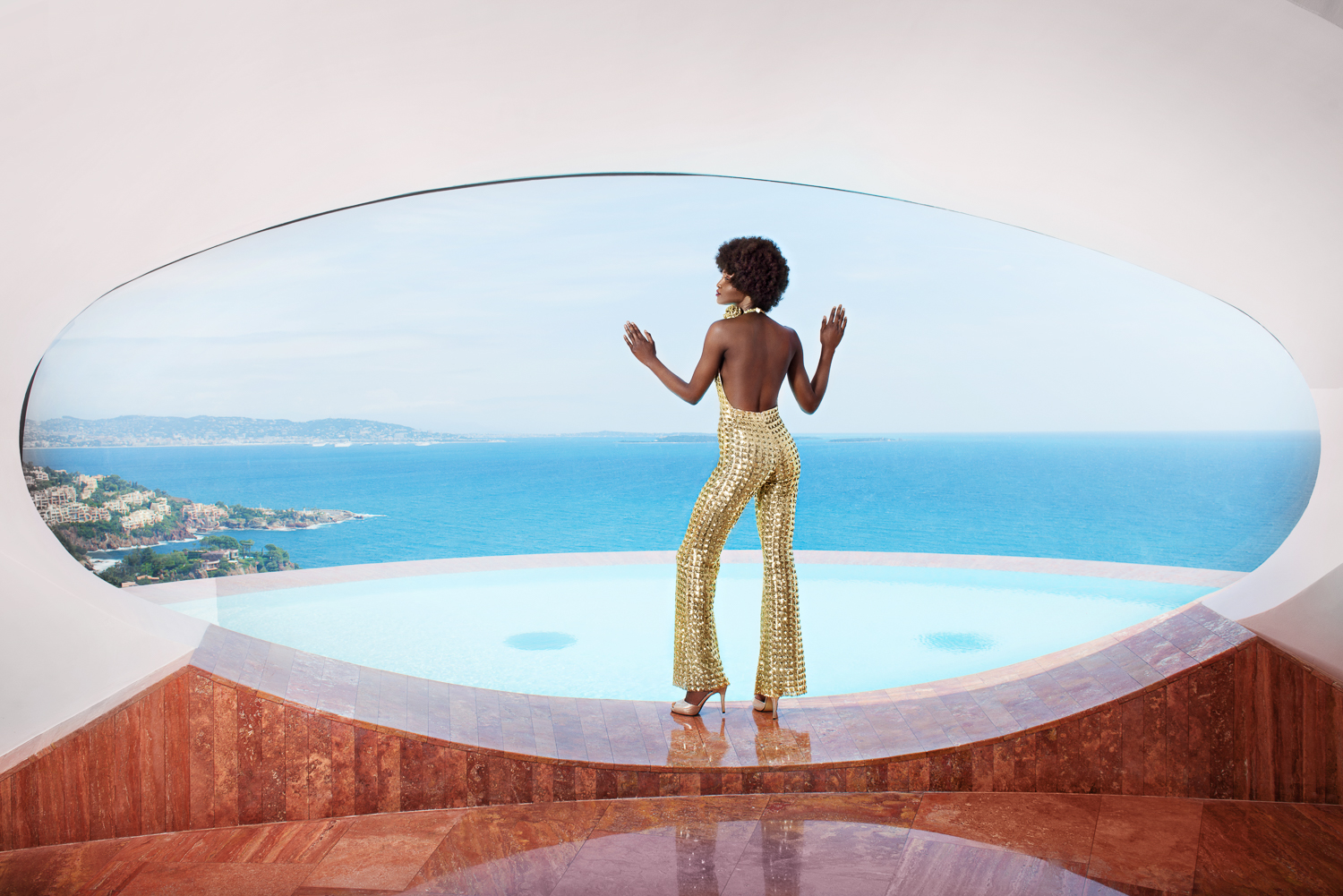 Fenêtre du grand salon,ouverture sur la baie de Cannes , Le Palais bulle de Pierre Cardin par Gil Zetbase